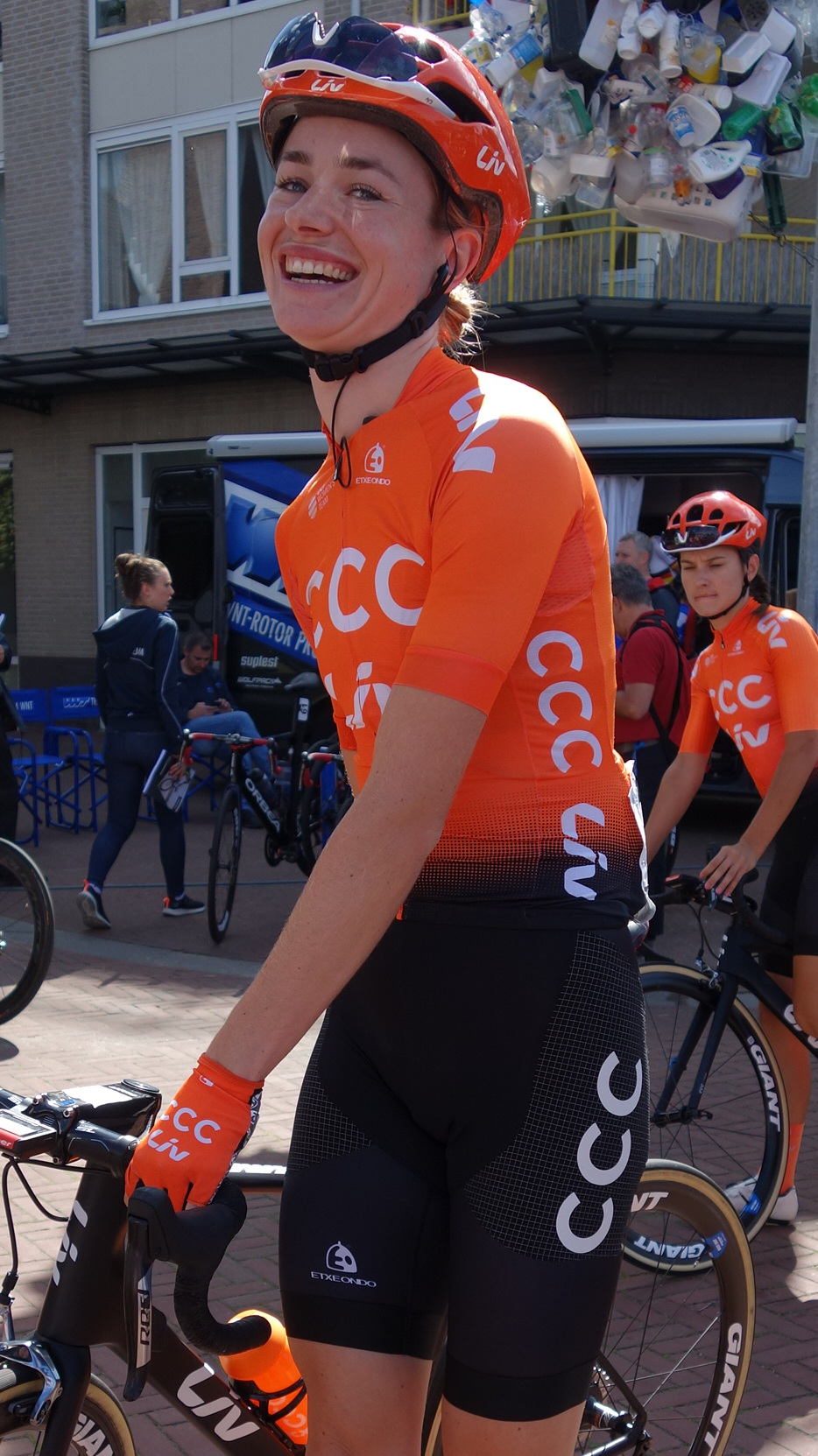 Riejanne Markus (CCC-Liv) bij de start van de eerste etappe van Stramproy naar Weert in de Boels Ladies Tour 2019